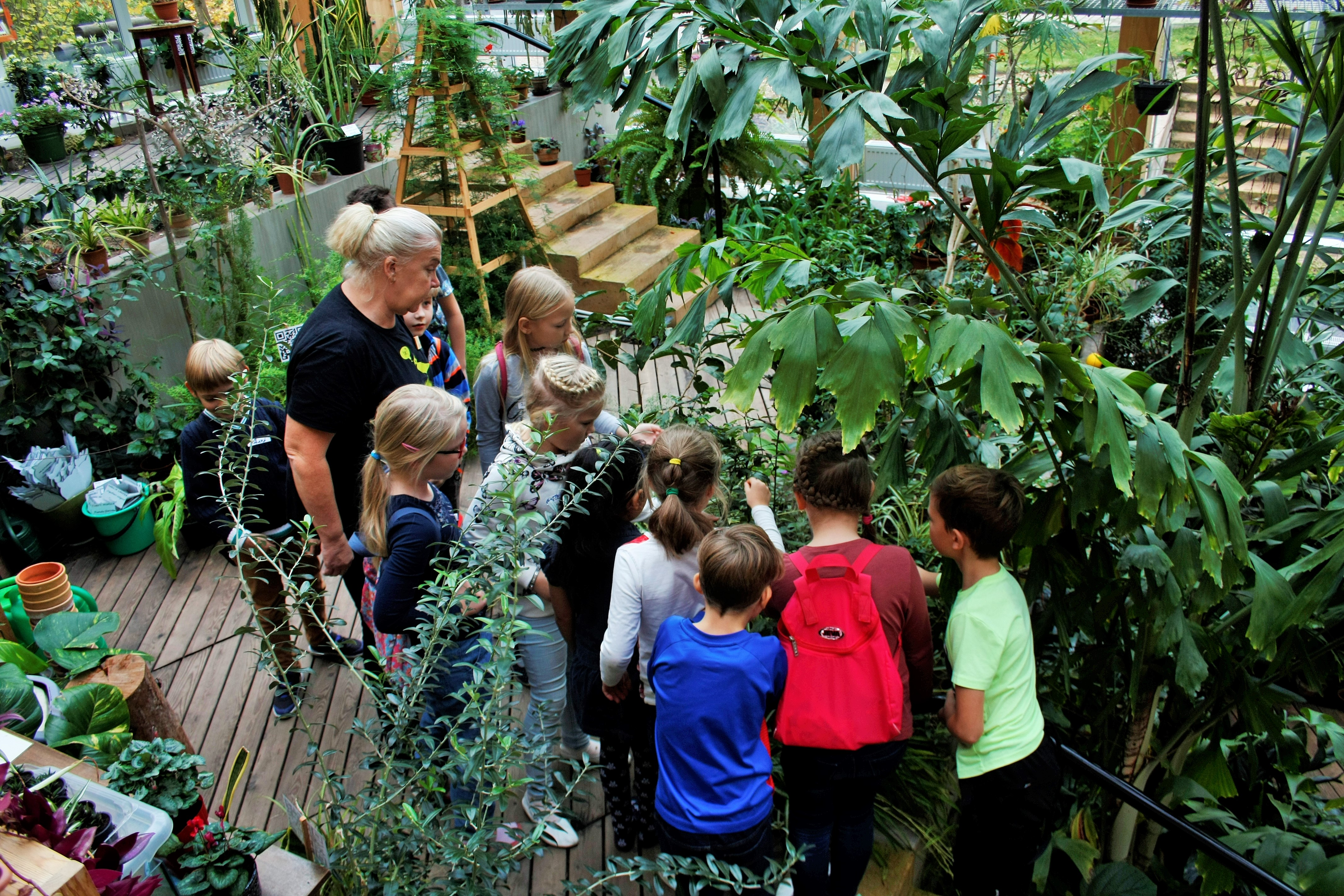 Huvikooli lapsed talveaias